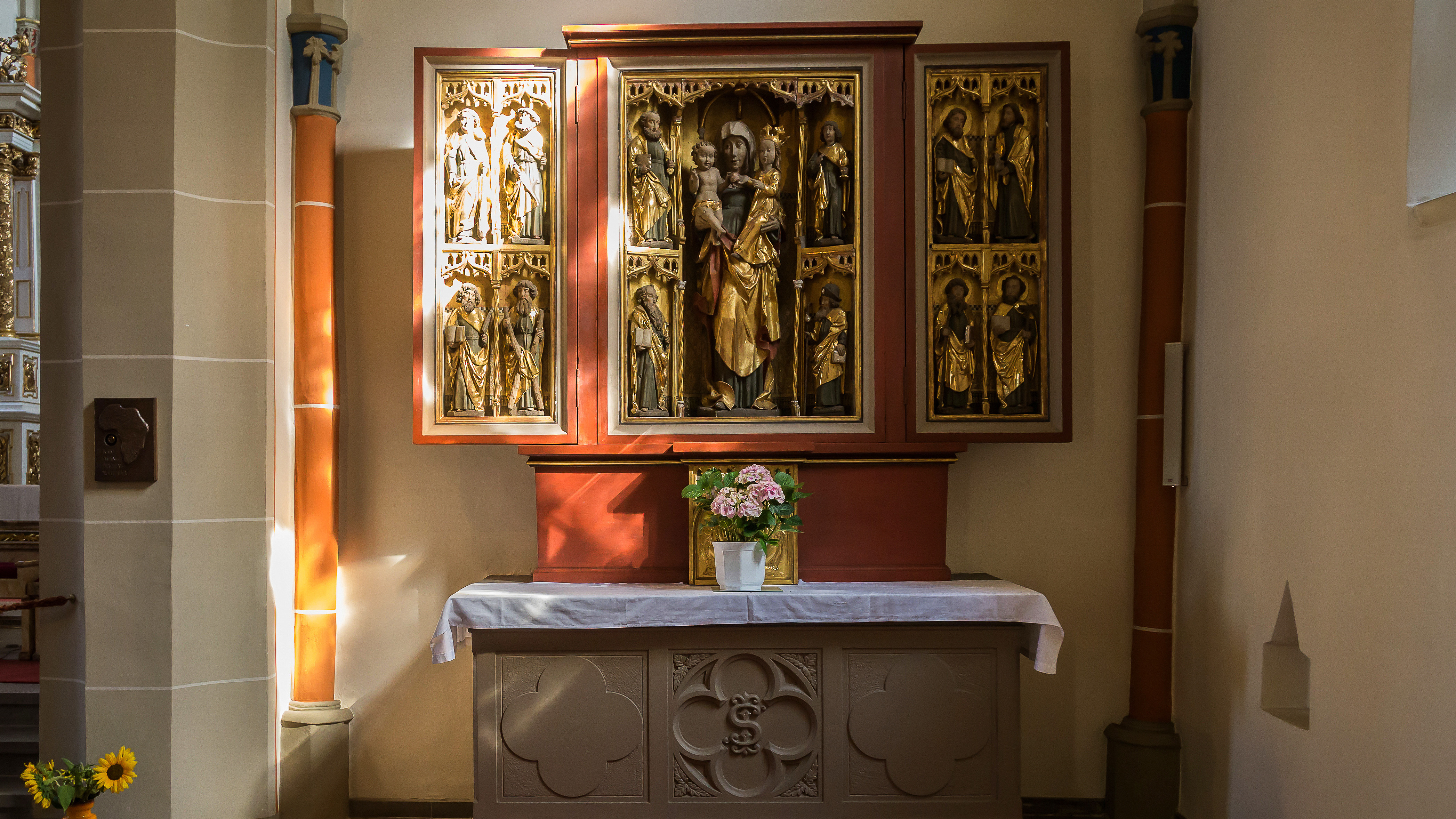 Heilbad Heiligenstadt Neustädter Kirchgasse 5 St. Ägidien Pfarrkirche (katholisch) Ausstattung rechtes Seitenschiff.Der Annenaltar ist ein Kleinod der Hochgotik.Er zeigt die heilige Mutter Anna als "Anna Selbdritt" mit den 12 Apostel.Nach dem Krieg wurde er vom Kloster Zella erworben.